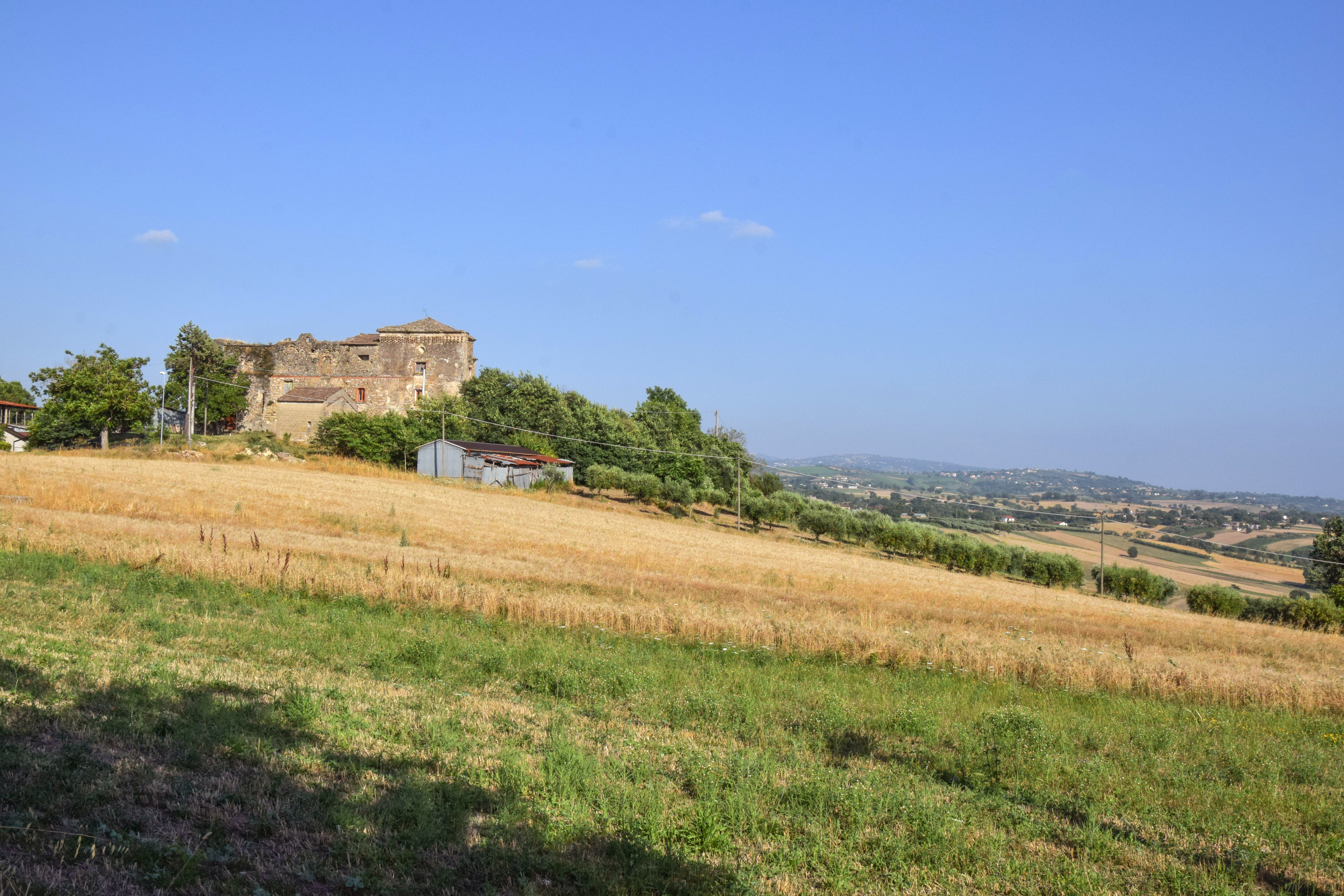 Il Casino del Principe, costruzione voluta da Federico II al Cubante di Calvi (BN)